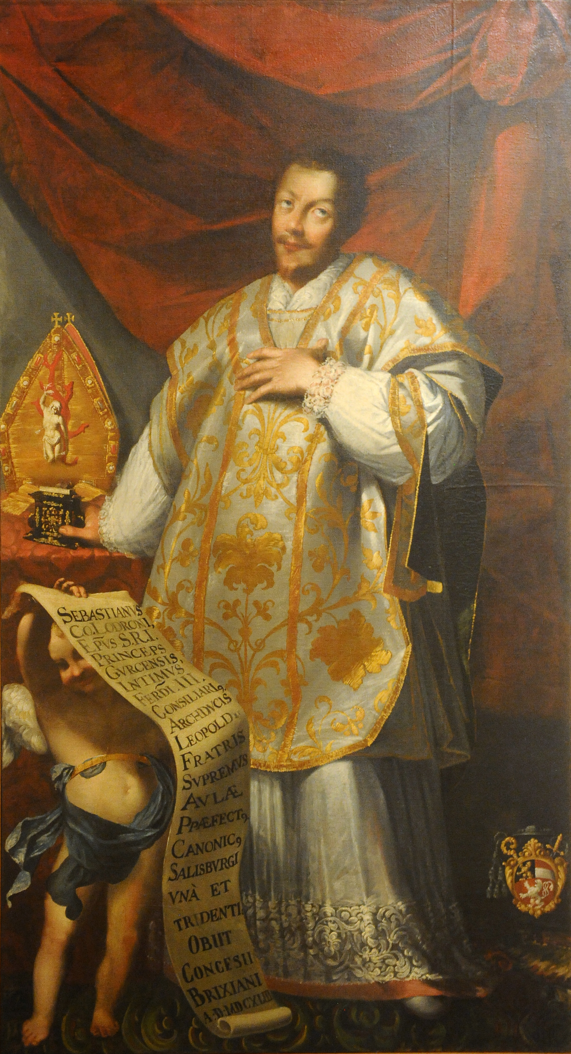 Nicolò Dorigati, Ritratto di Sebastiano Lodron, sec. XVII (documentato al 1693), olio su tela, Museo Diocesano Tridentino, sede di Villa Lagarina.